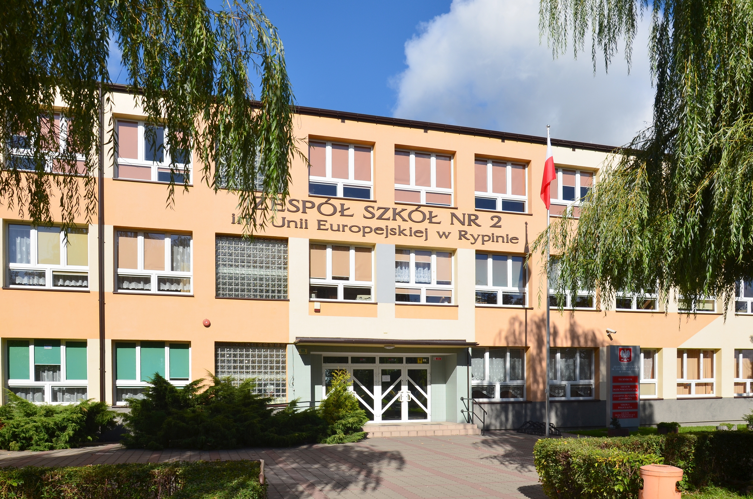 Zespół Szkół nr 2 im. Unii Europejskiej w Rypinie